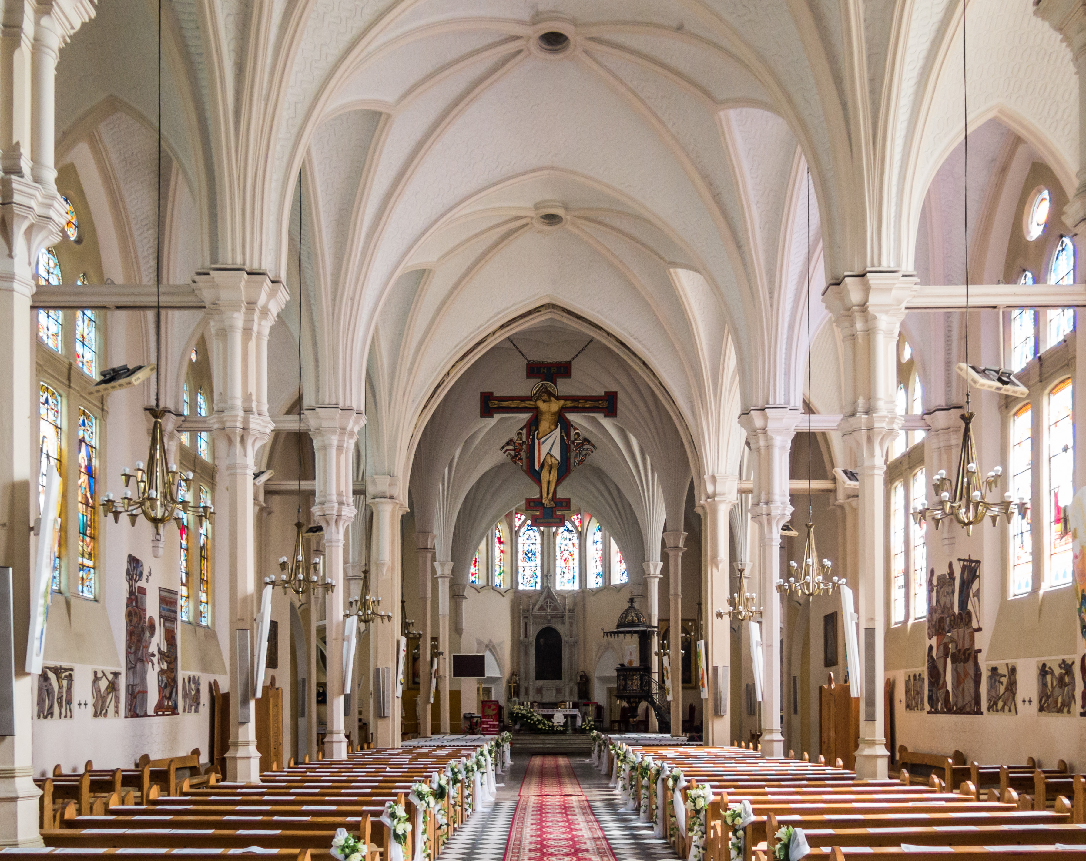 Wnętrze kościoła parafialnego pw. św. św. Piotra i Pawła w Ciechocinku.